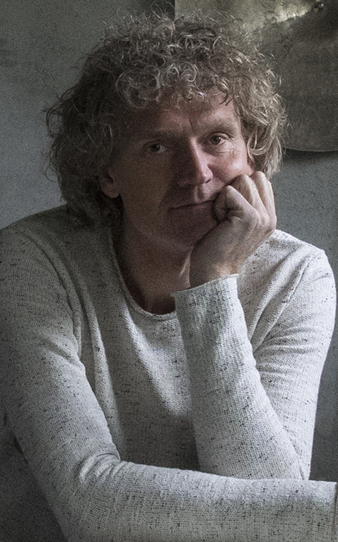 Template:Terje isungset